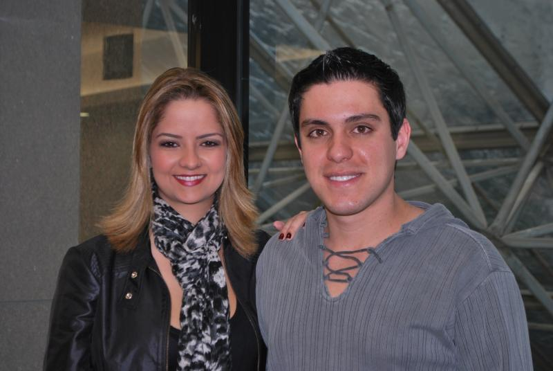 Maria Cecília & Rodolfo durante uma coletiva de imprensa em 2010.